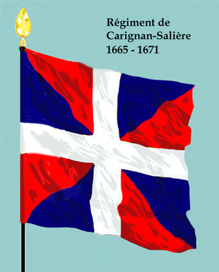 Ordonnanzfahne eines königlich französischen Infanterie-Regiments. - Entnommen und überarbeitet aus: „LES UNIFORMES ET LES DRAPEAUX DE L'ARMÉE DU ROI“ Marseille 1899. (Drapeau d'Ordonnance d' un régiment française d'infanterie royale.)